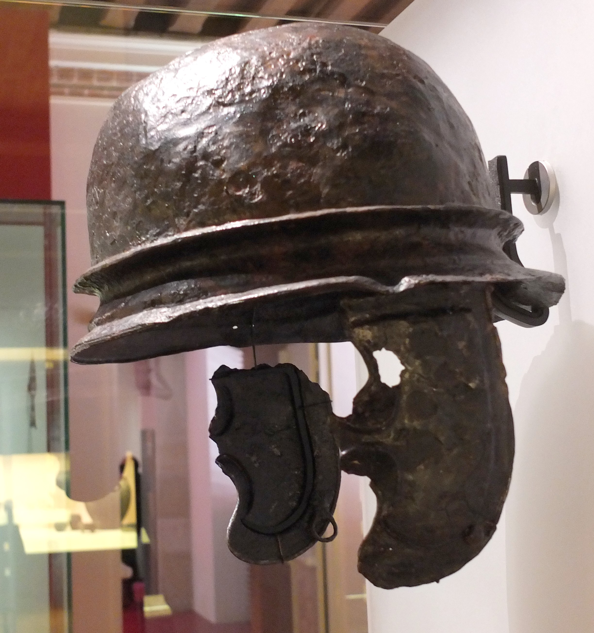 Casque gaulois (Ier siècle av-JC.), trouvé aux alentours d'Alise-Sainte-Reine, site d'Alésia (Côte-d'Or), fer - Musée d'archéologie nationale de Saint-Germain-en-Laye (Yvelines).